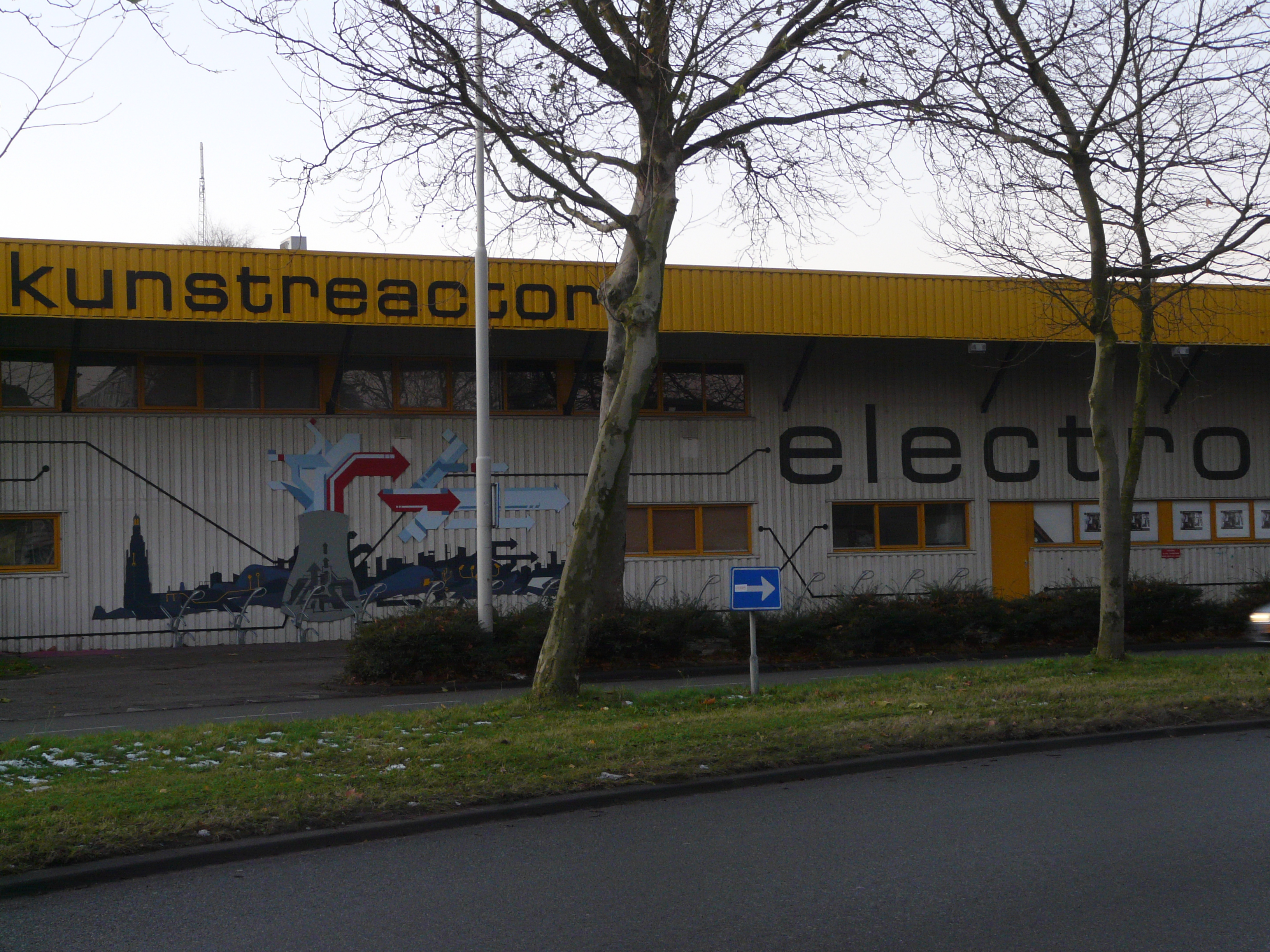 Zicht op een deel van de voorzijde van de Kunstreactor Electron gelegen aan de Belcrumweg in de wijk de Belcrum in het noorden van Breda. Het is een culture en kunstinstelling. Het ligt niet ver van de Belcrumhaven en Station Breda